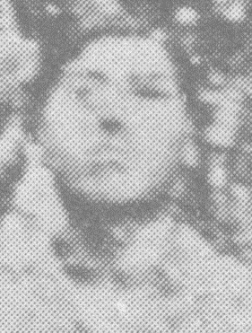 豚松（荒神山手打式、1871年）